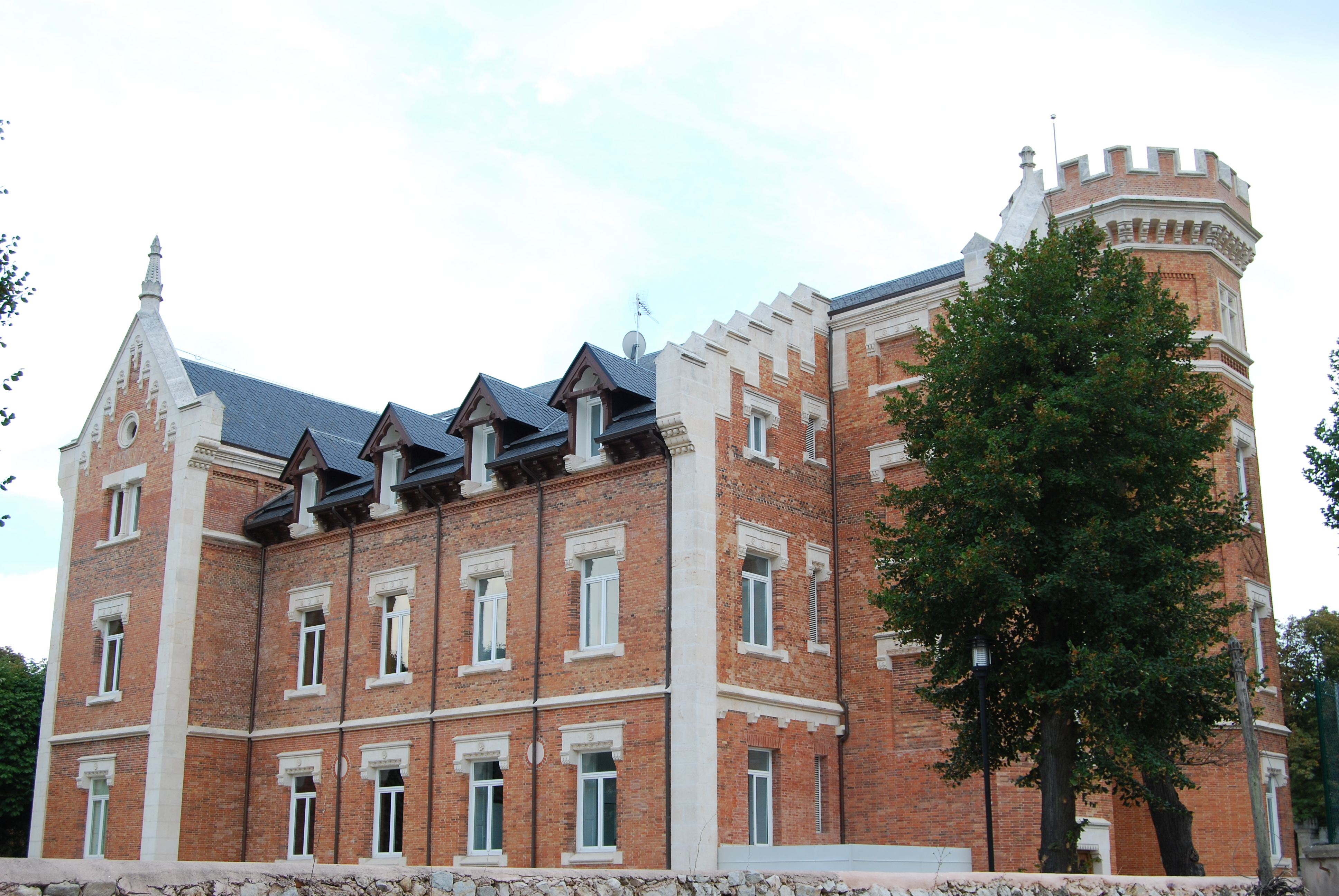 Fachada norte del Palacio de Muguiro o de la Isla. Burgos